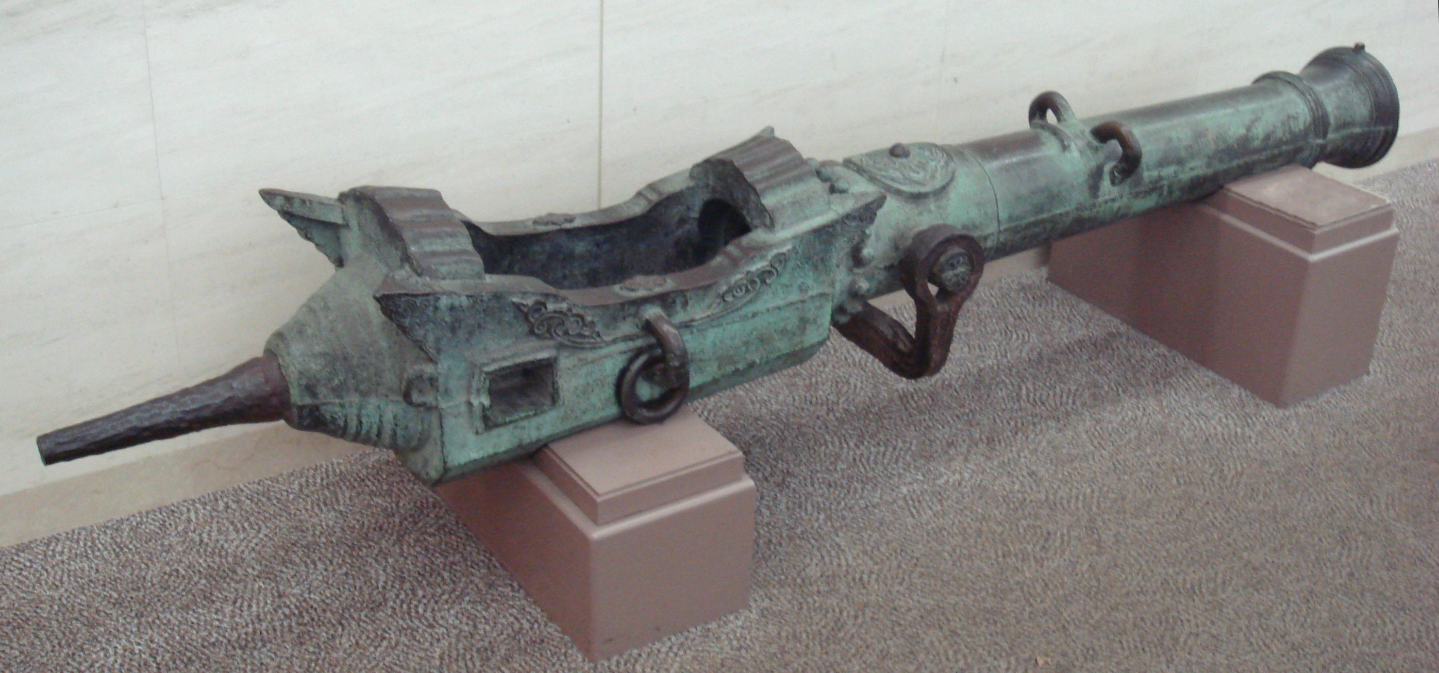 Oda Nobunaga swivel breech loading_gun. Yasukuni Shrine.